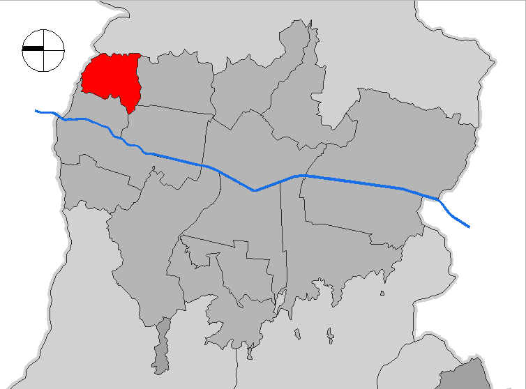 mapa de la comuna . Medellín, Colombia.